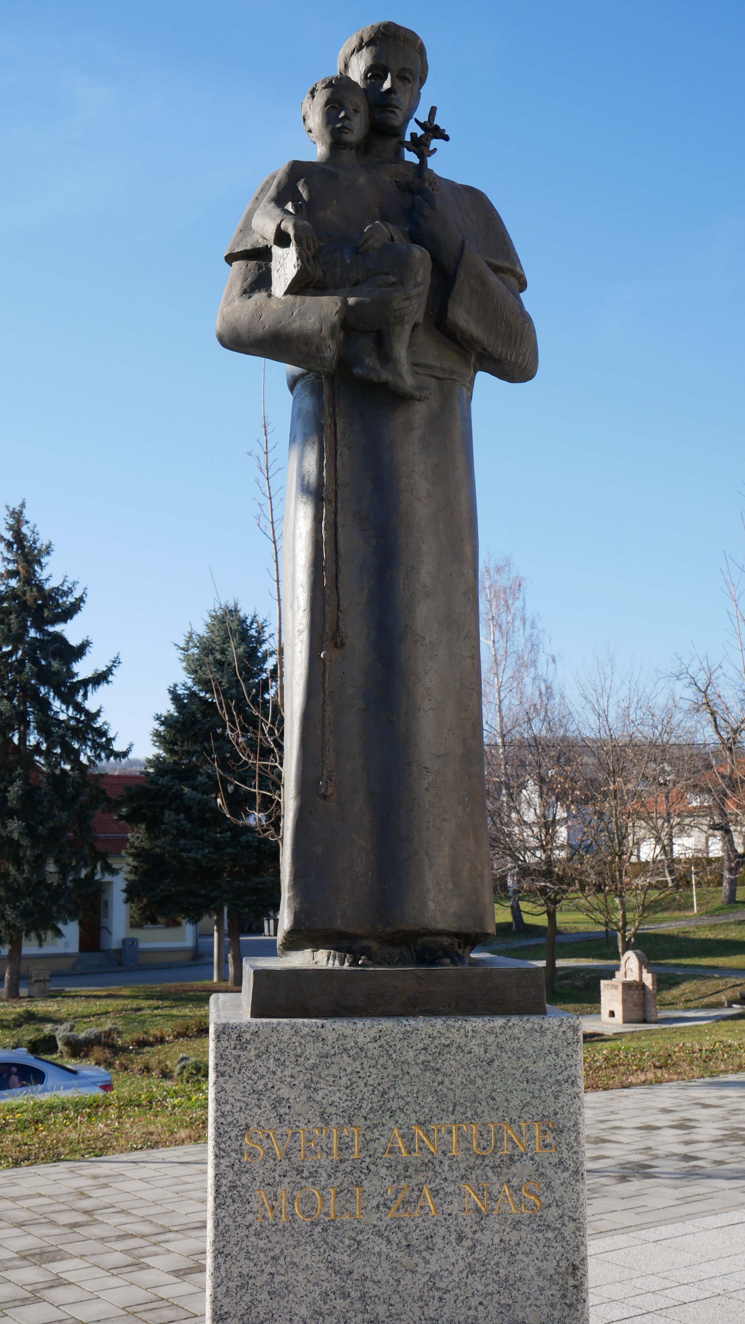 Kip sv. Antuna Padovanskog u Podvinju